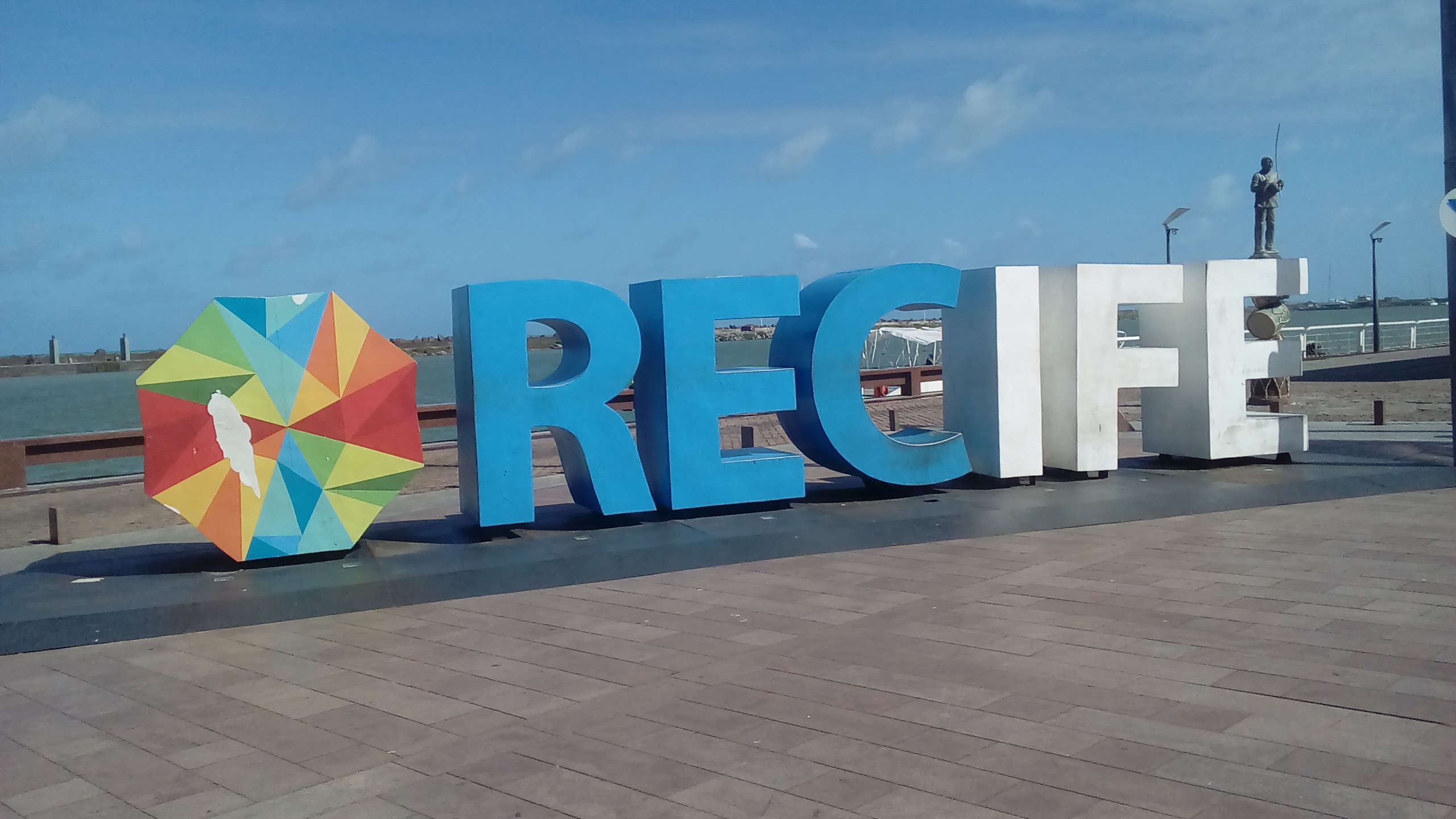 Praça Rio Branco (Marco Zero), um dos locais mais visitados da cidade de Recife, no estado de Pernambuco - Brasil